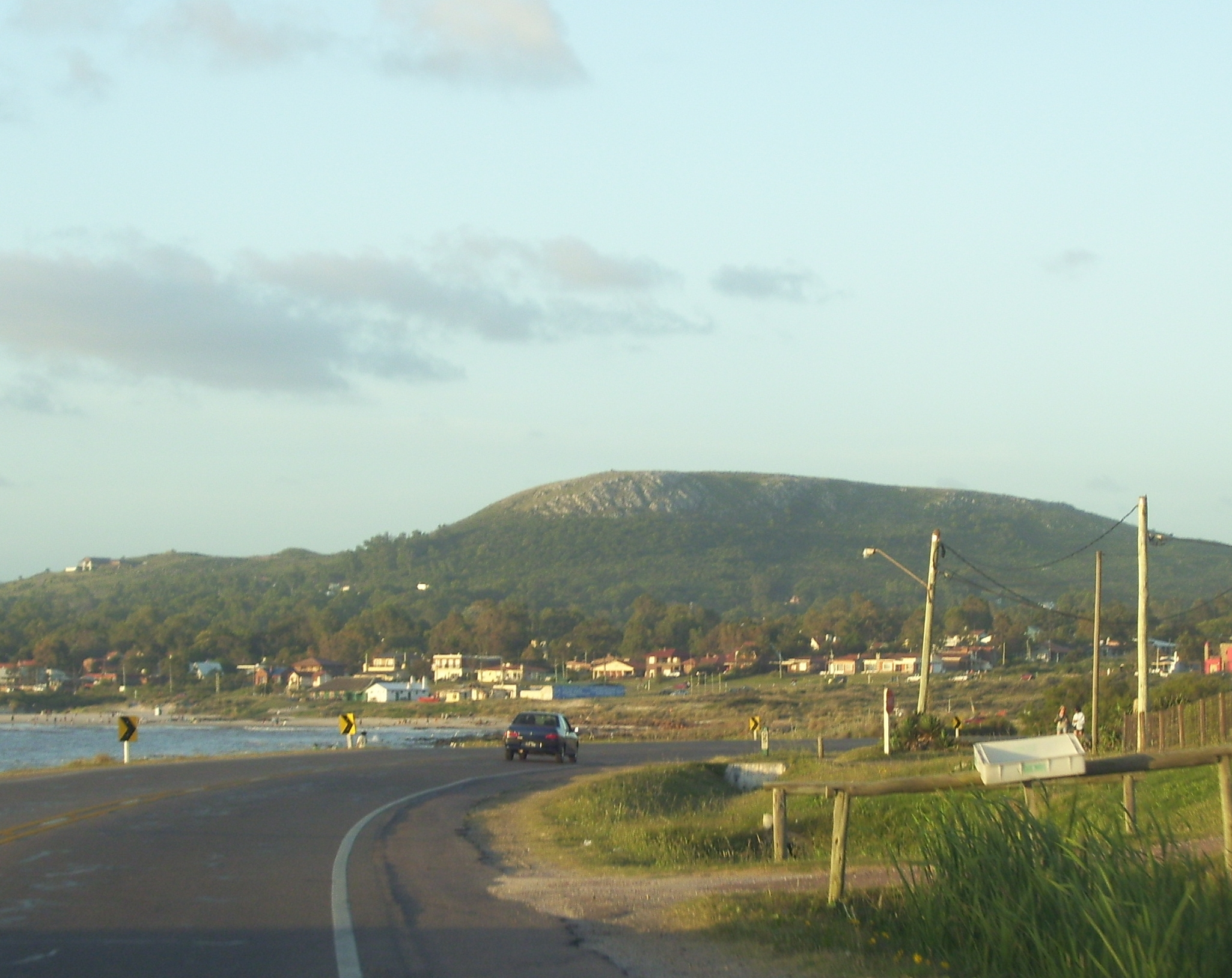 Vista del Cerro de los Burros desde Playa Grande, Piriápolis, Uruguay.